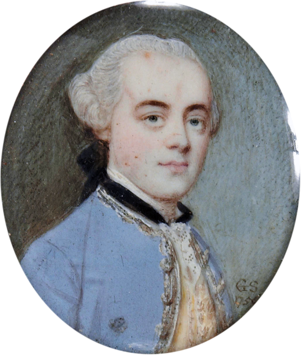 Anthony Aufrère (1730-1814)